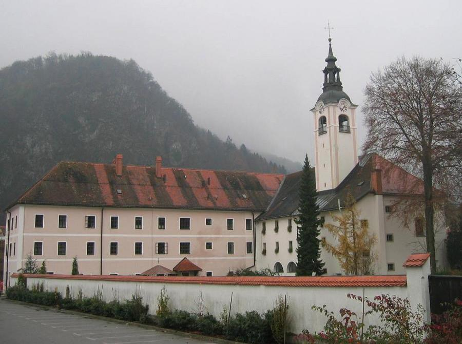 Franciscan Monastery in Kamnik, Slovenia.